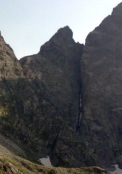 Północna ściana Żabiego Konia widziana z Żabiej Lalki. U podnóża wierzchołek Buli pod Rysami przez którą przechodzi szlak turystyczny na Rysy, widać niewielkie sylwetki ludzi.